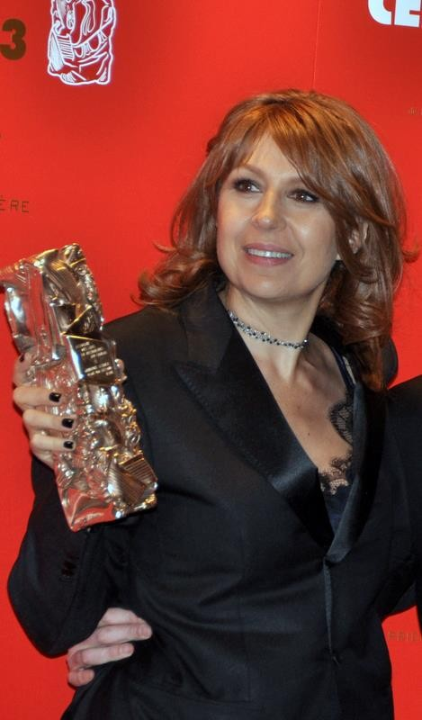 Valérie Benguigui à la cérémonie des César du cinéma